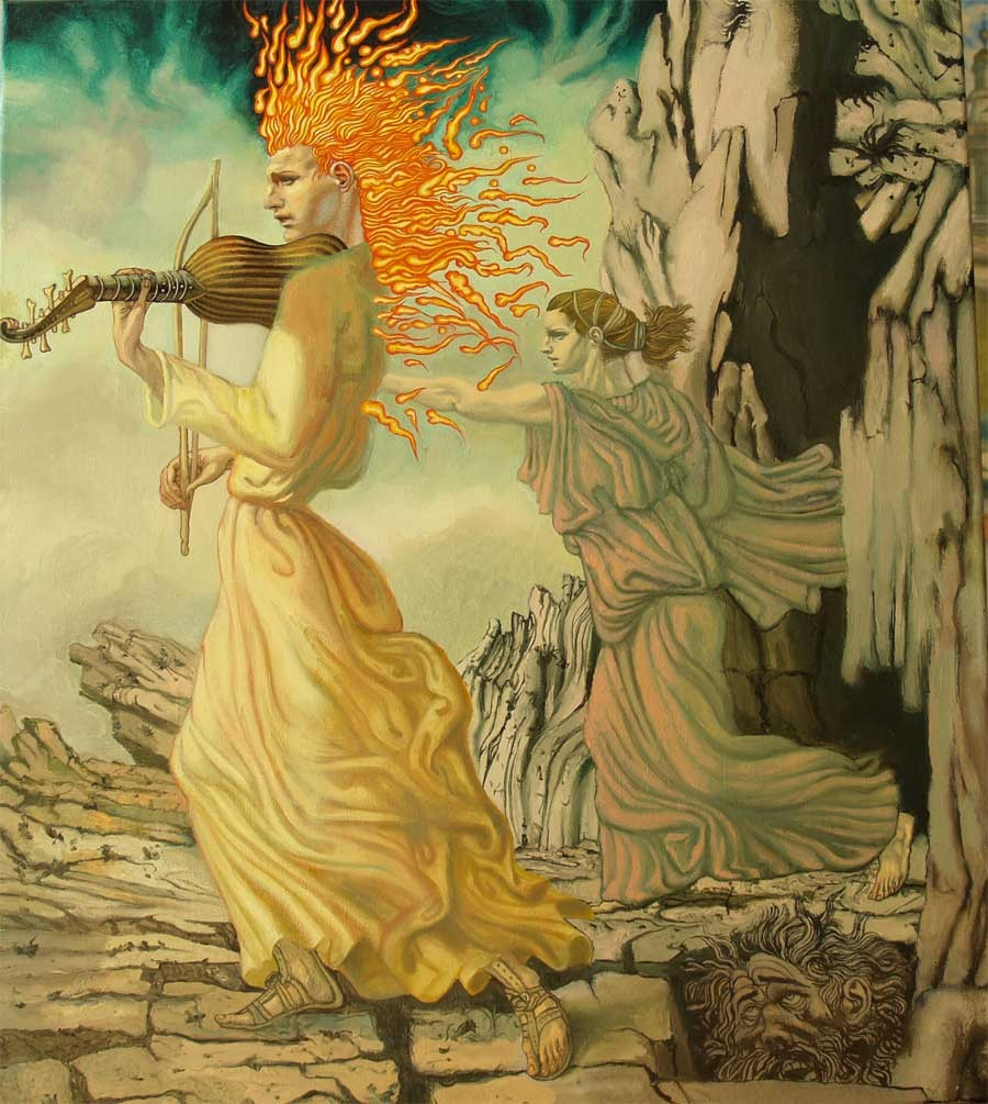 Станковая картина, холст, масло